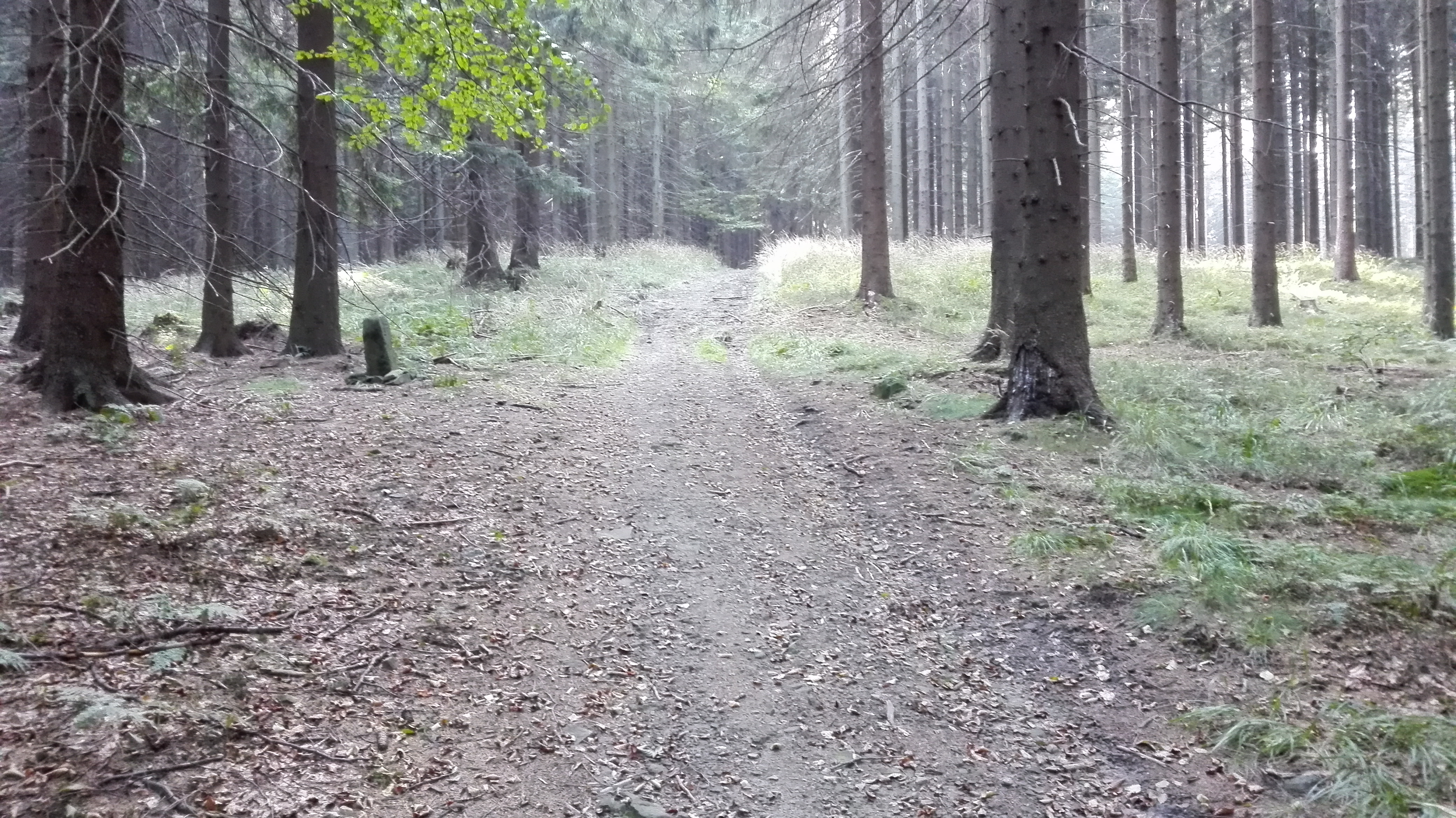 Vrcholové partie Čupelu, hory v Moravskoslezských Beskydech